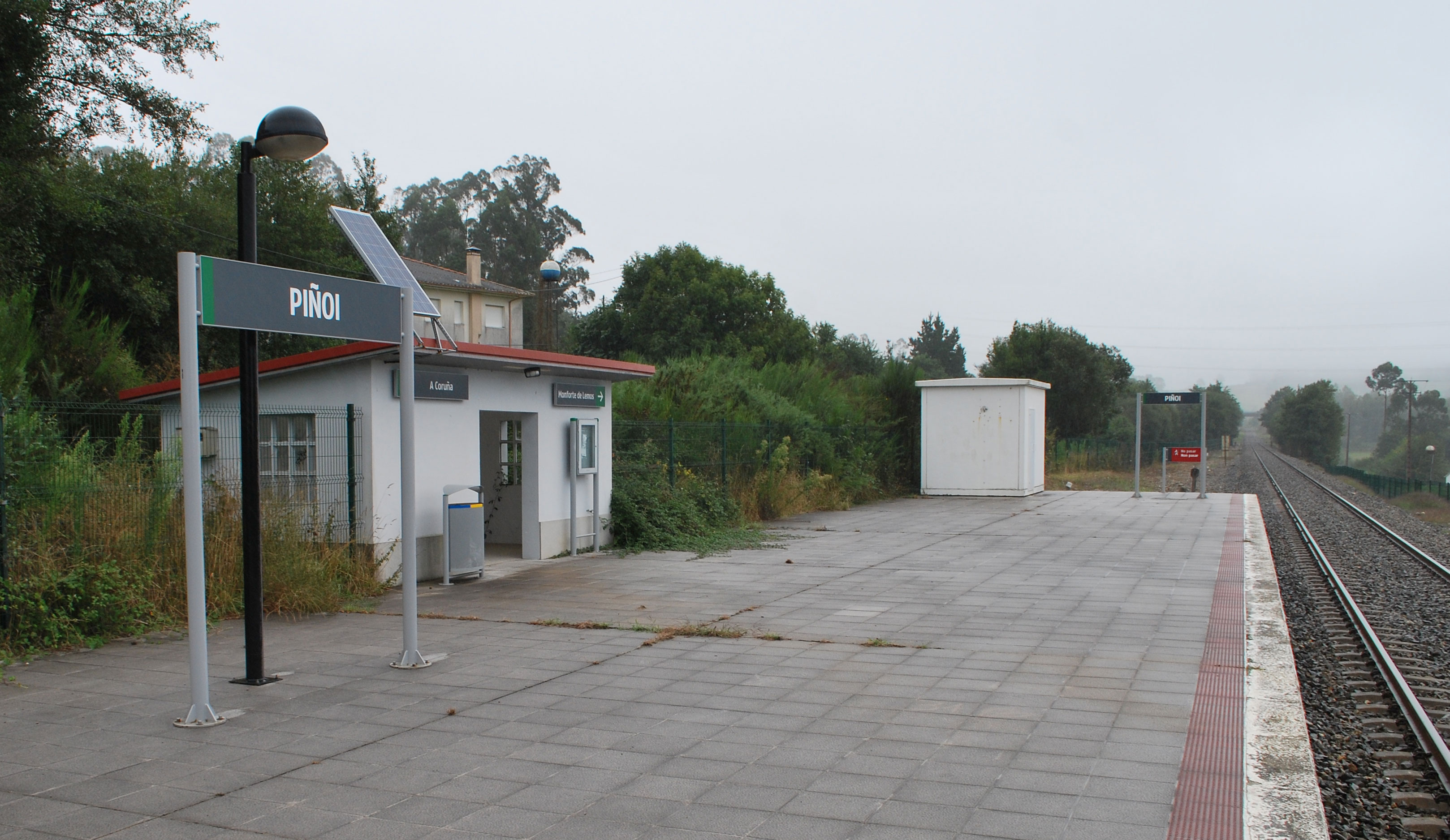 Vista do Apeadoiro de Piñoi en Cesuras A Coruña Galiza